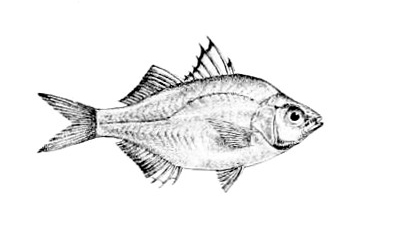 Pseudambassis baculis = Parambassis baculis